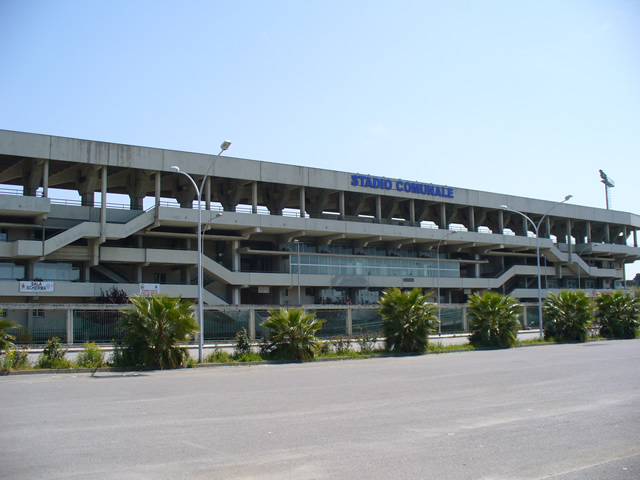 Stadio Marco Tomaselli a Caltanissetta, inaugurato nel 1989.